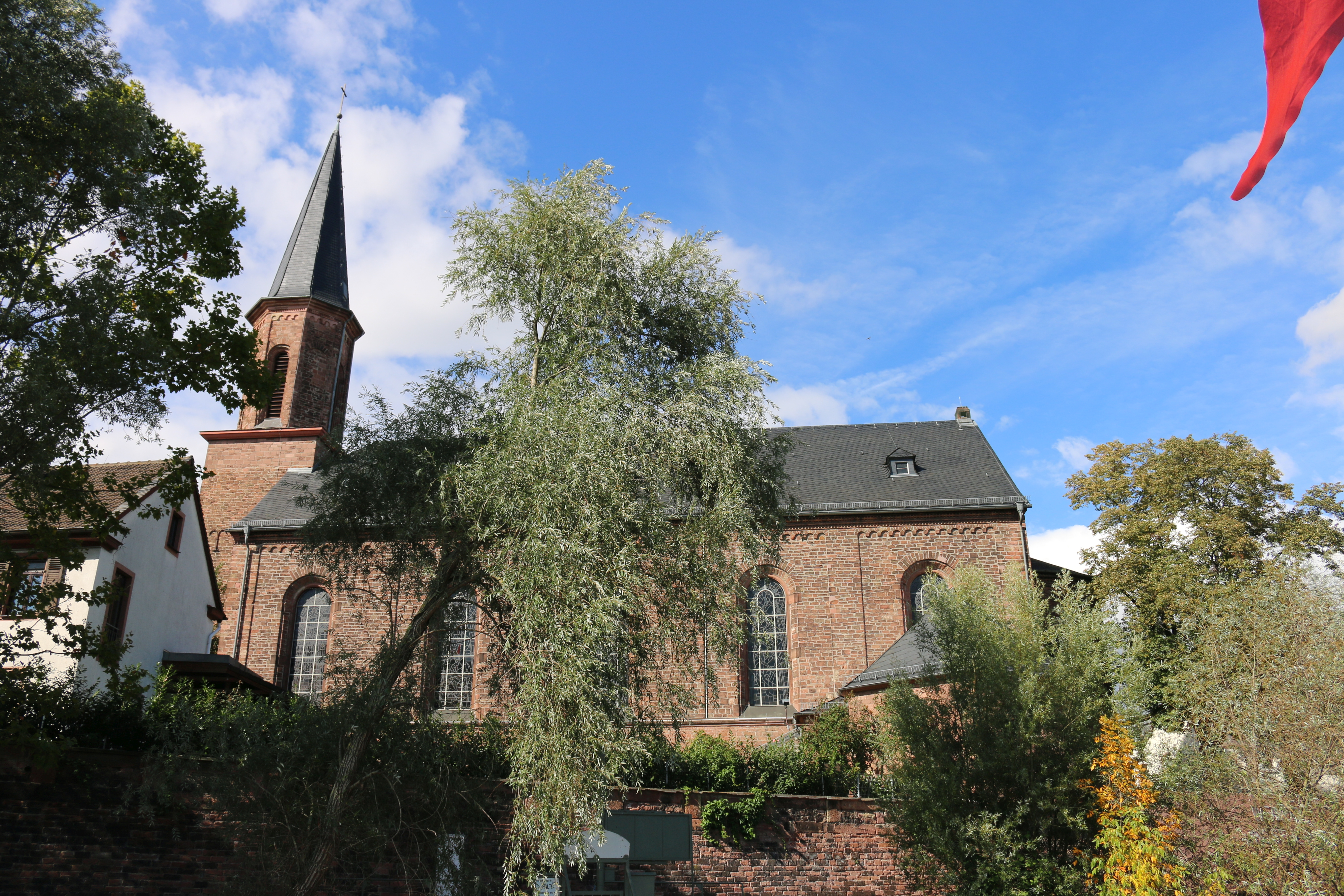 Mainz-Kostheim: Pfarrkirche